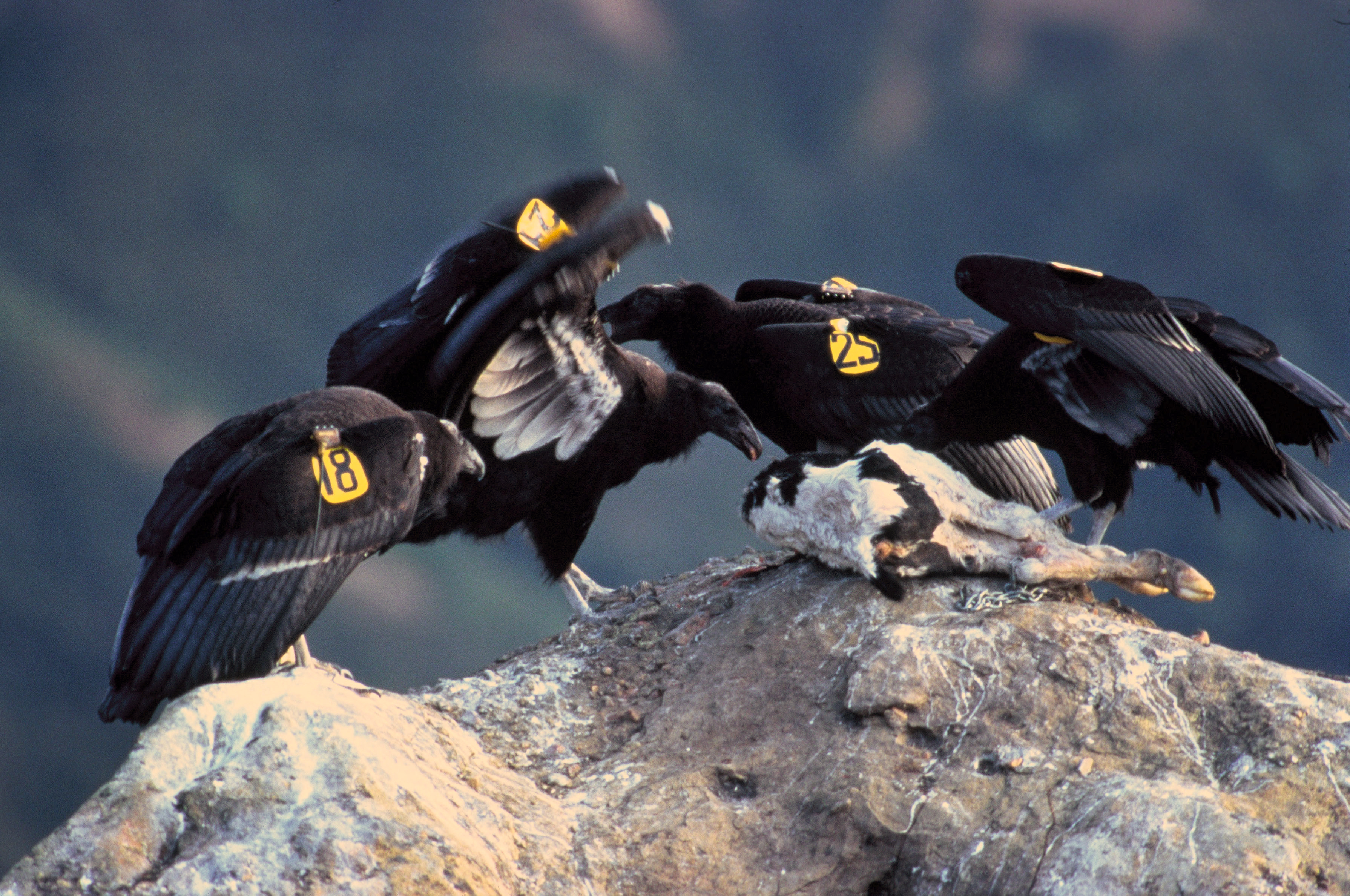 California Condor (juveniles)